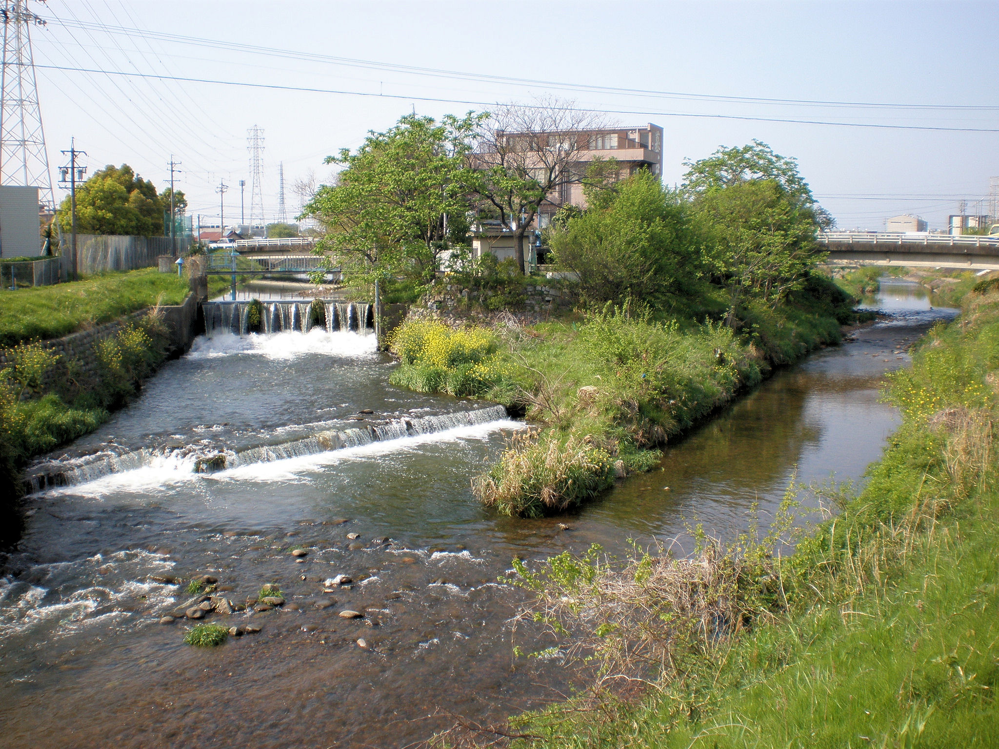 新木津用水と大山川の合流点（撮影場所：小牧市下末）。左上から流れてくるのが新木津用水。右上から左下へと流れるのが大山川。